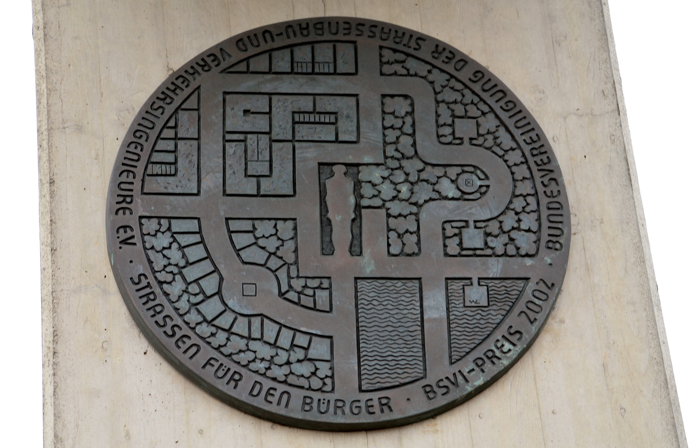 2002 vergab die Bundesvereinigung der Straßenbau- und Verkehrsingenieure den BSVI-Preis (Motto: "Straßen für den Bürger" für die Umgestaltung der Pferdeturmkreuzung in Hannover-Kleefeld, wo zuvor am Übergang der Hans-Böckler-Allee zur Straße Am Pferdeturm die mehrspurige Unterführung des Messeschnellweges errichtet worden war ...